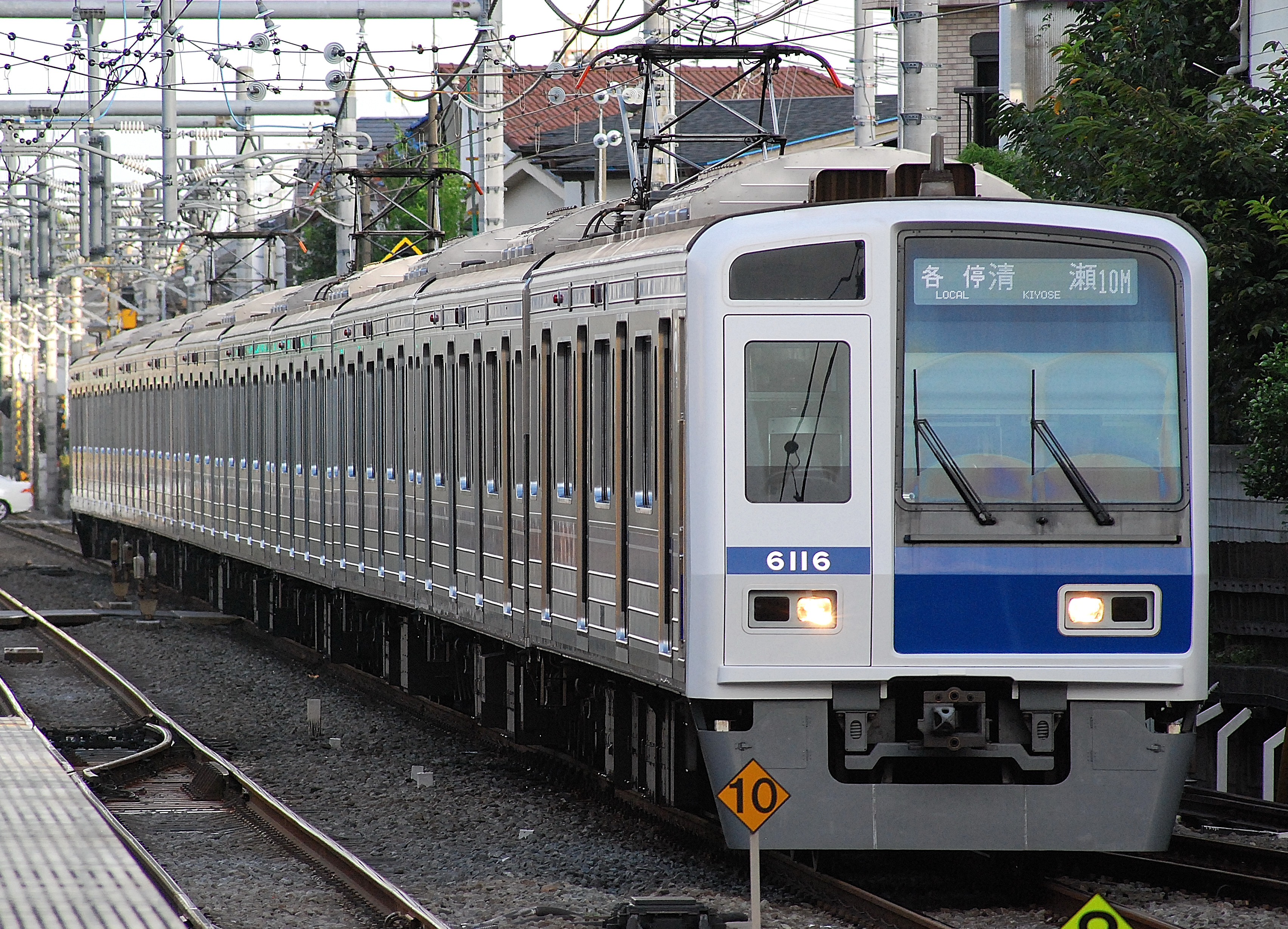 西武池袋線を走行する西武6000系0番台（6116F）、ひかりヶ丘駅ホームから撮影。